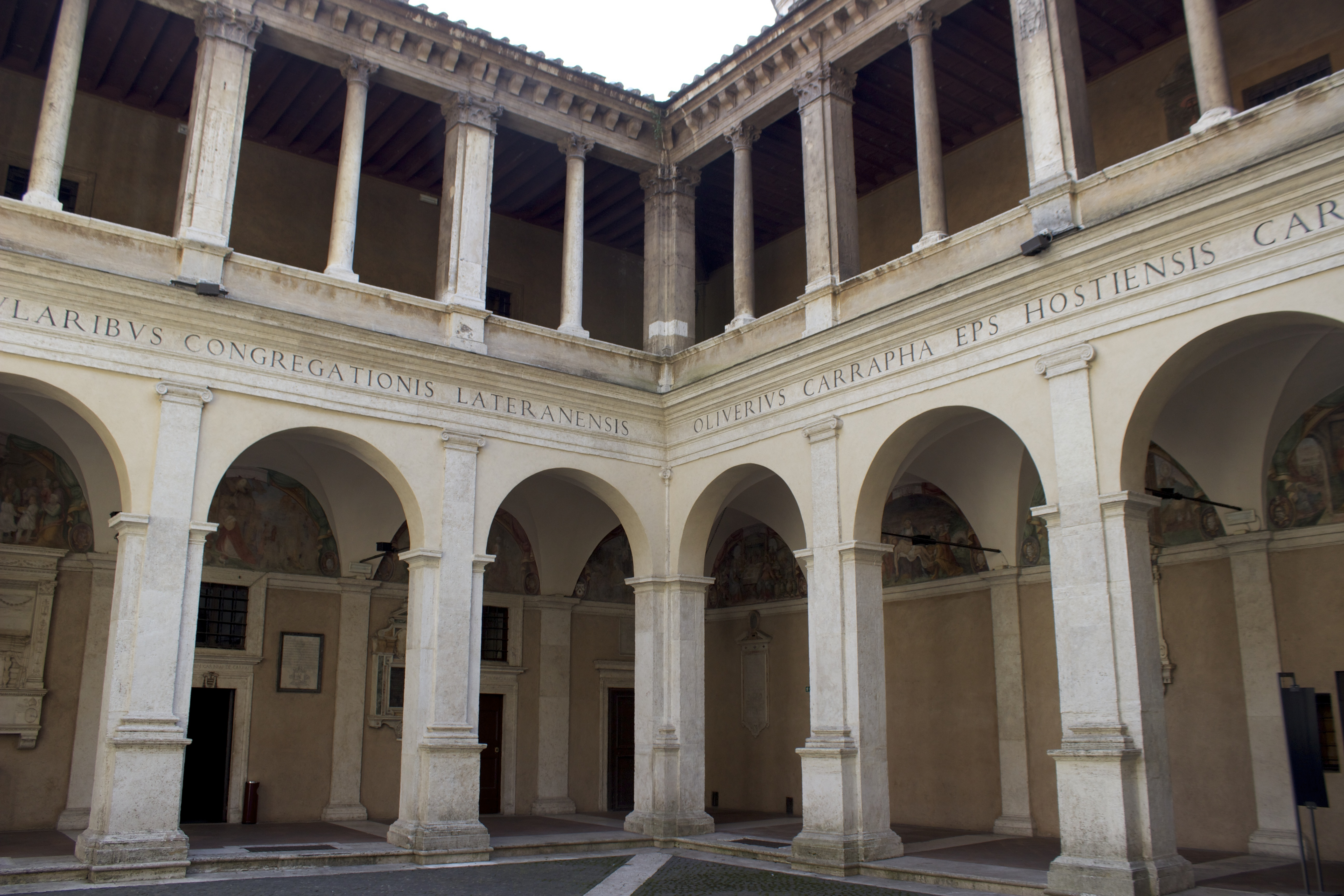 Roma. Santa Maria della Pace. Claustro.